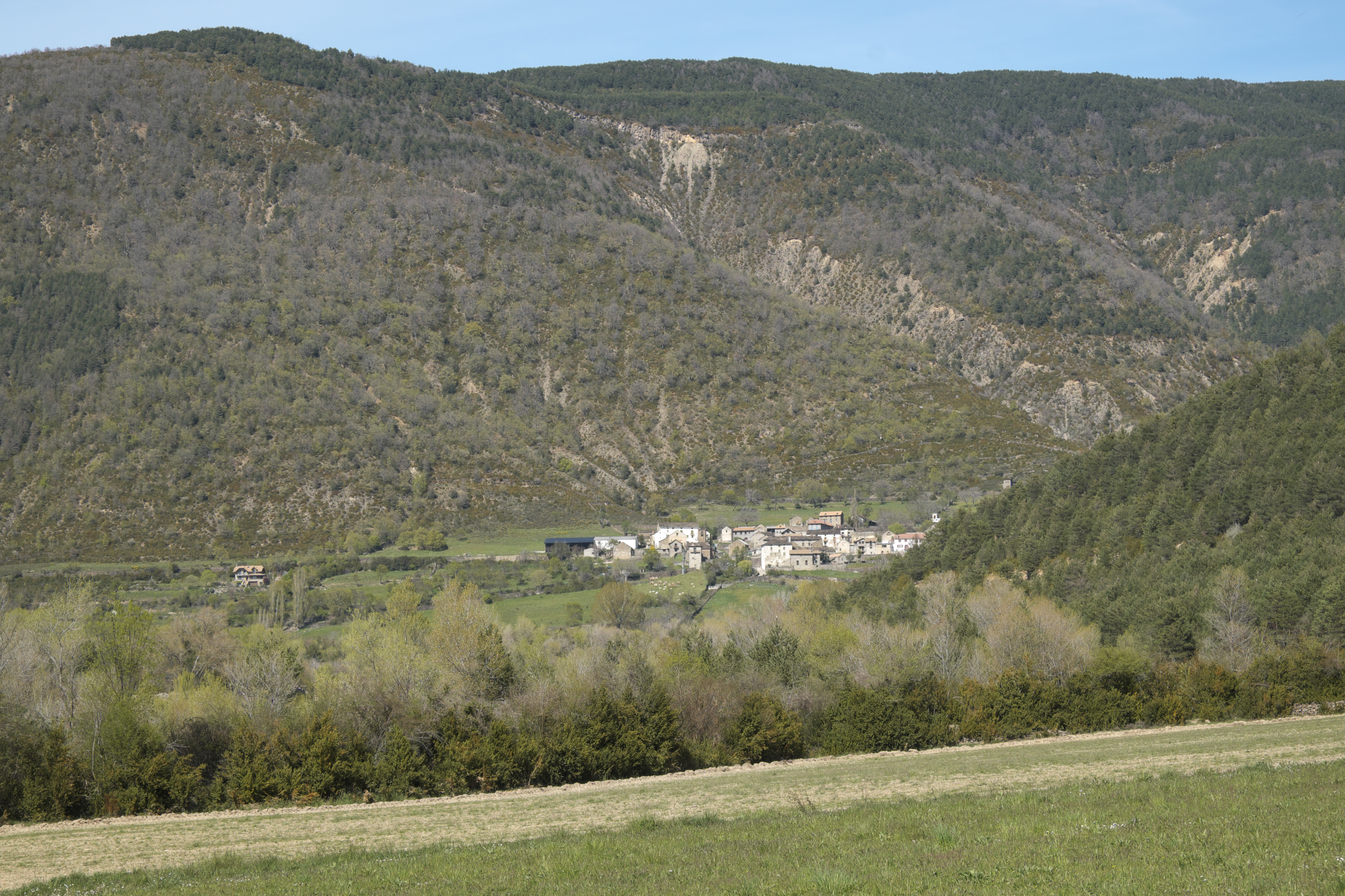 Blick auf den Ort Oliván in der Gemeinde Biescas in der Provinz Huesca (Aragón/Spanien)